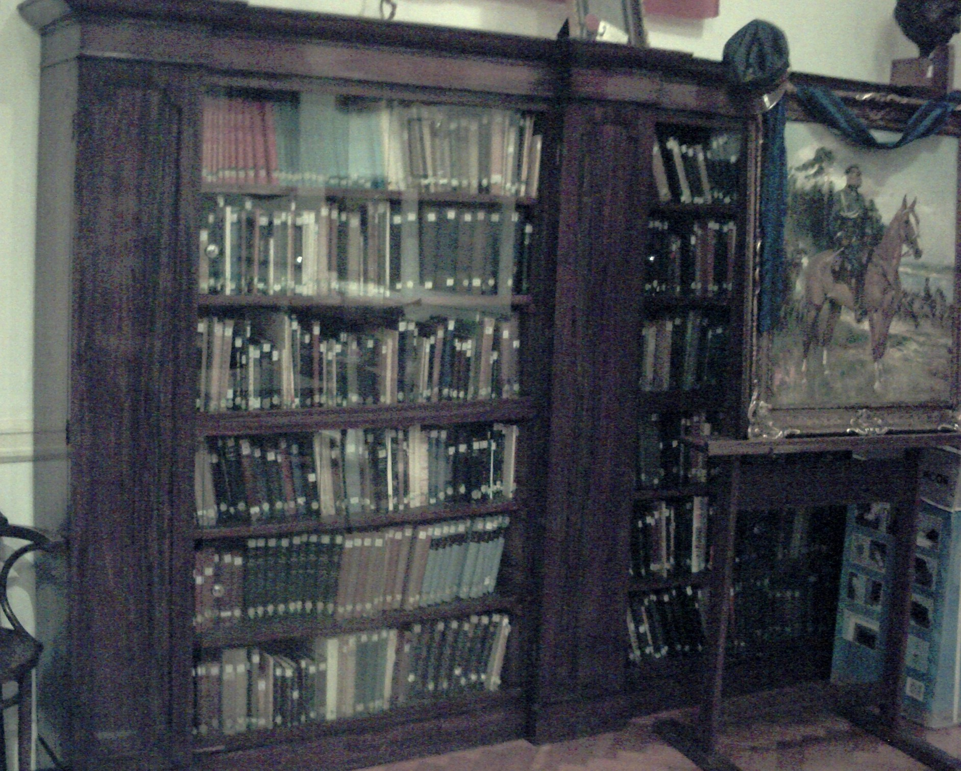 Księgozbiór eksponowany Instytutu Józefa Piłsudskiego w Londynie